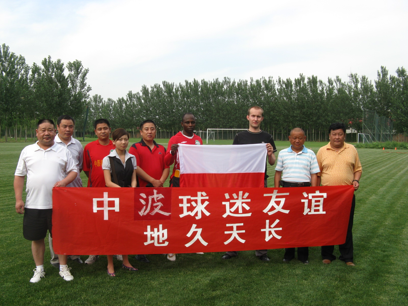 Zrobiono podczas wizyty polskiego studenta na treningu Henan Jianye, transparent głosi "Chińsko-polska przyjaźń kibiców, wieczna i niezmienna"